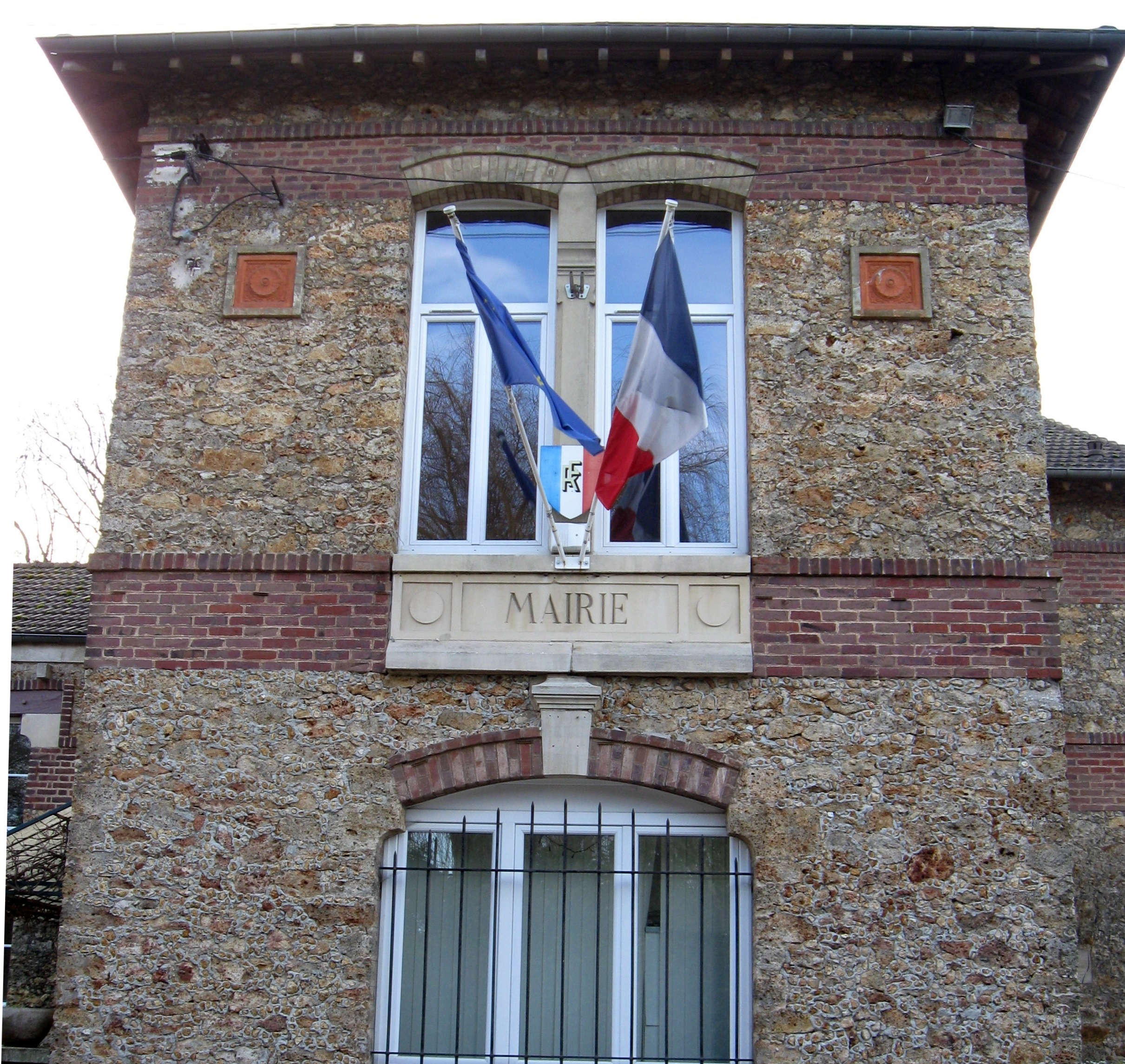 Mairie de Neufmoutiers-en-Brie. (Seine-et-Marne, région Île-de-France).